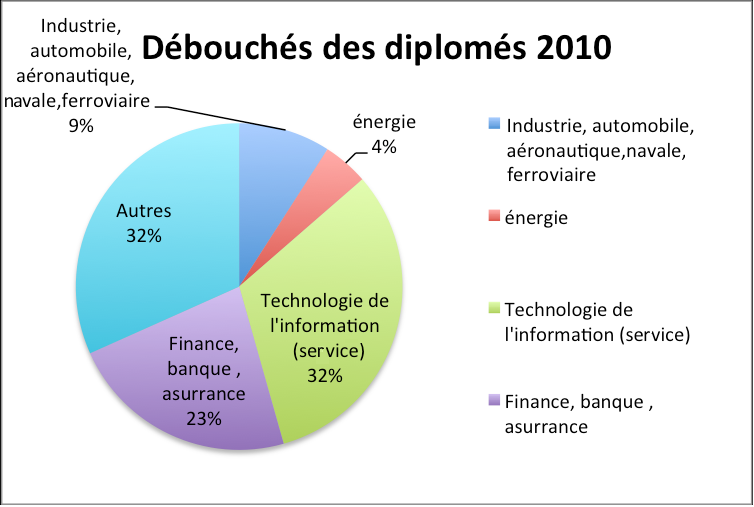 Le graphique représente les différents secteurs d'activités des diplômés de ESILV issus de la promotion 2010